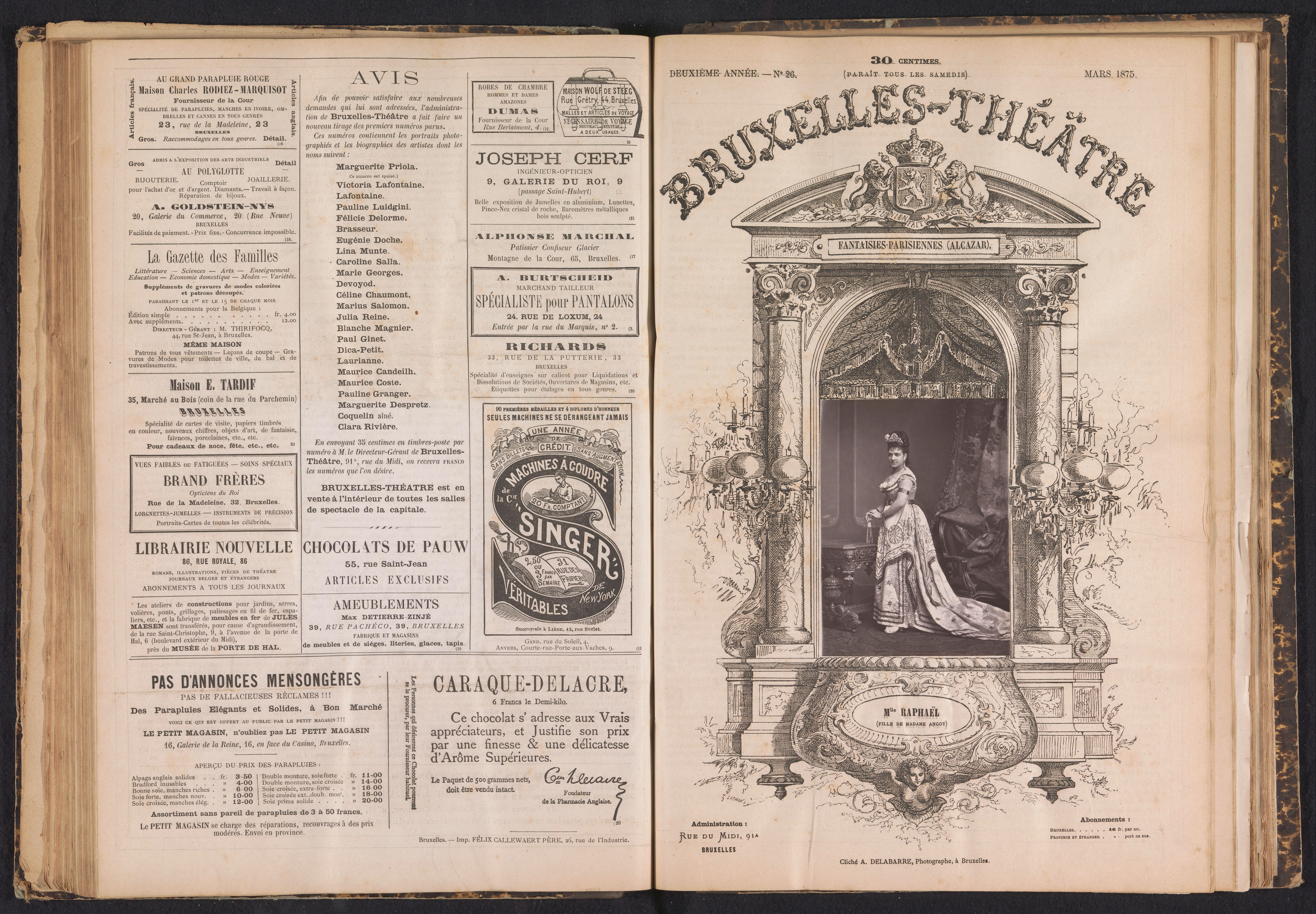 IdentificatieTitel(s): Portret van mademoiselle Raphaël in Fille de madame AngotMlle Raphaël (Fille de madame Angot) (titel op object)Objecttype: fotomechanische afdruk bladzijde Objectnummer: RP-F-2001-7-1467A-43Opschriften / Merken: nummer, recto, gedrukt: ‘No 26.’VervaardigingVervaardiger: fotograaf: Albert Delabarre (vermeld op object)clichémaker: anoniemPlaats vervaardiging: BrusselDatering: ca. 1870 - in of voor 1875Materiaal: papier Techniek: WoodburytypieAfmetingen: prent: h 115 mm × b 86 mmOnderwerpWat: portrait of actor, actressVerwerving en rechtenCredit line: Aankoop met steun van de Mondriaan Stichting, het Prins Bernhard Cultuurfonds, het VSBfonds, het Paul Huf Fonds/Rijksmuseum Fonds en het Egbert KunstfondsVerwerving: aankoop 2001Copyright: Publiek domein